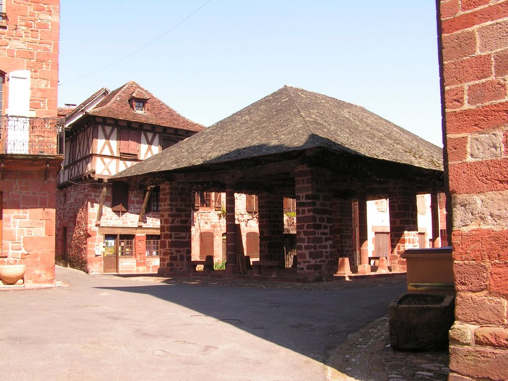 Halle en grès rouge